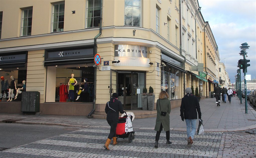 Tekstiilitaiteilija Annikki Karvisen nimeä kantava vaatemyymälä Helsingin Pohjoisesplanadilla.